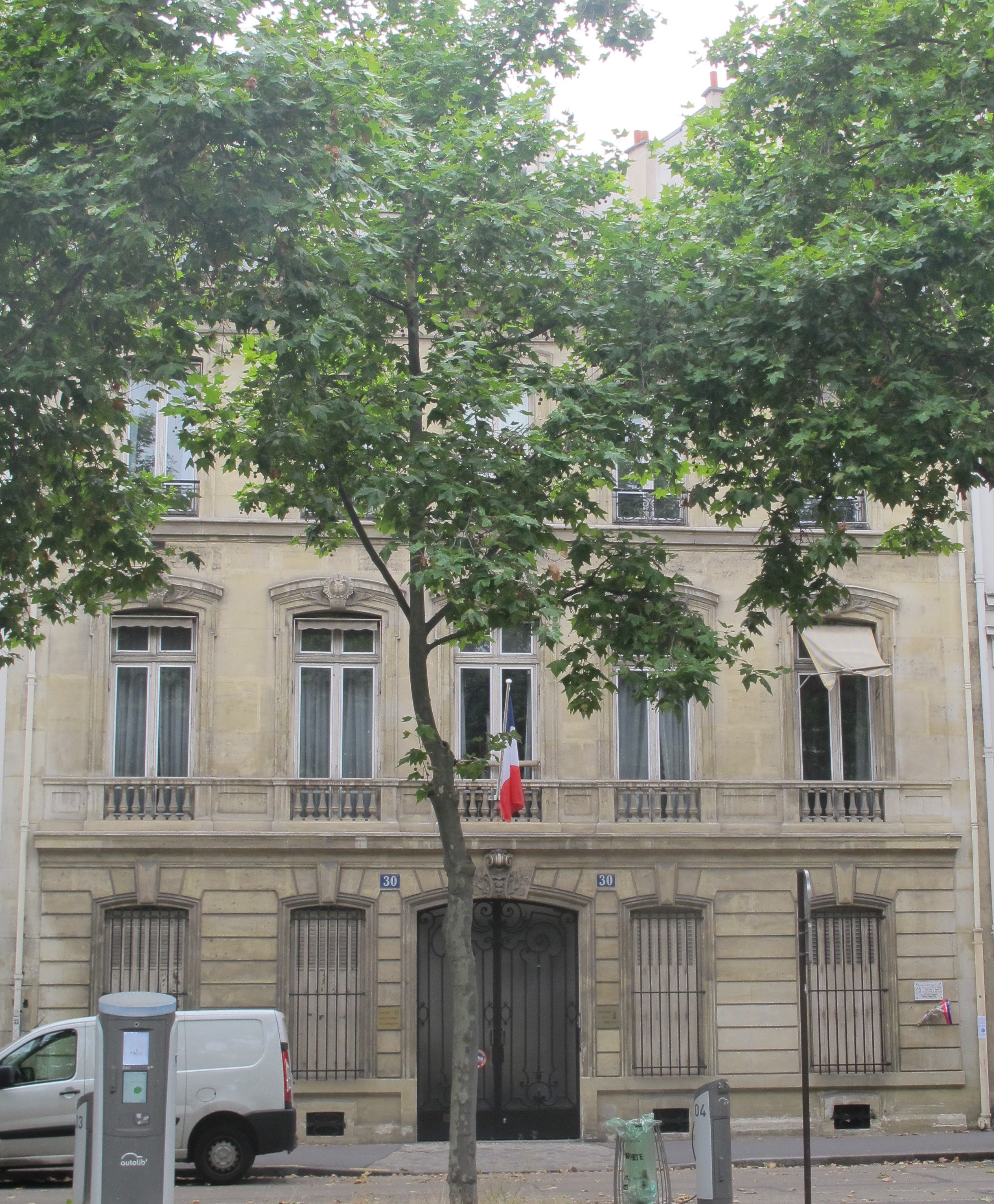 Fondation pour la mémoire de la déportation et de la fondation de la Résistance, 30 boulevard des Invalides (Paris, 7e).